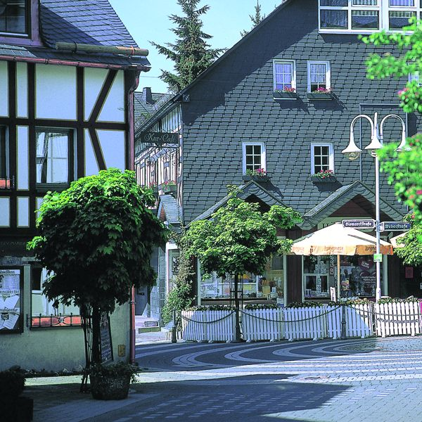 Fachwerkhäuser in Bad Marienberg